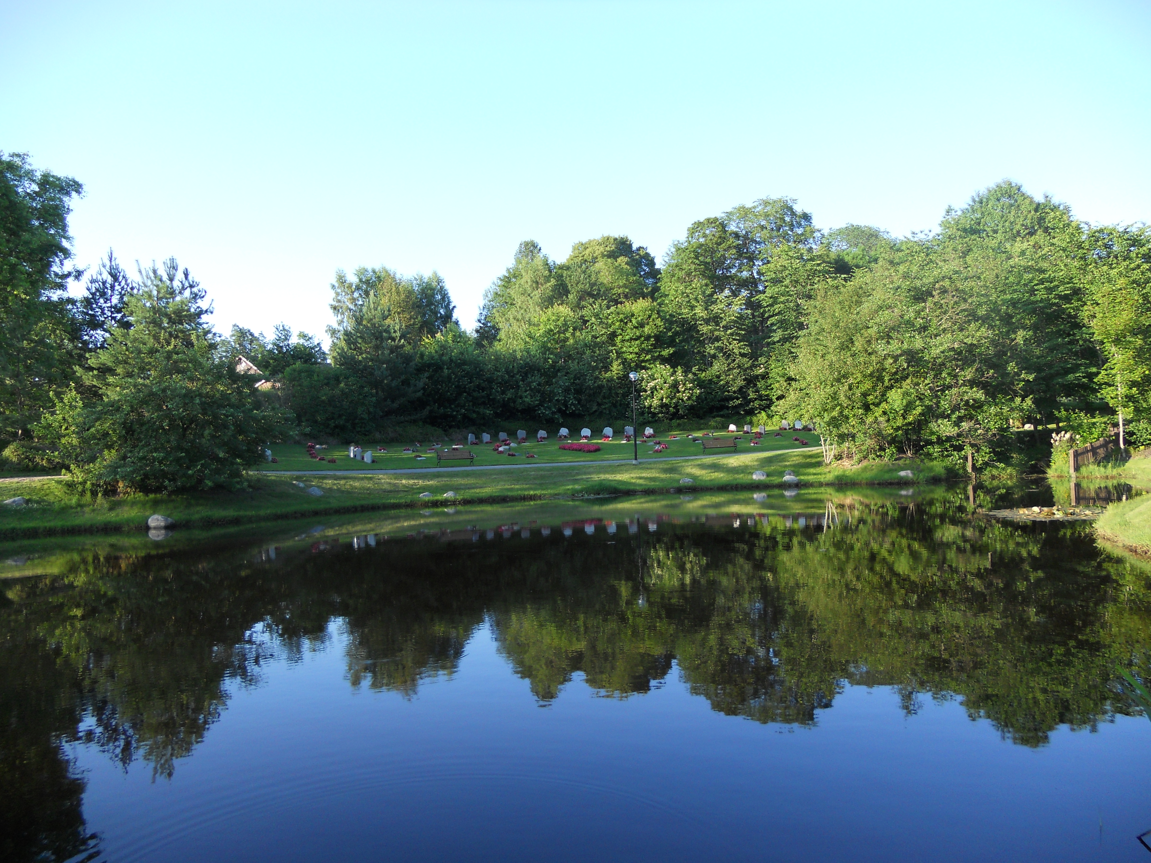 Katrinedals begravningsplats på Blåsut i Vänersborg. Gravar vid vattnet.